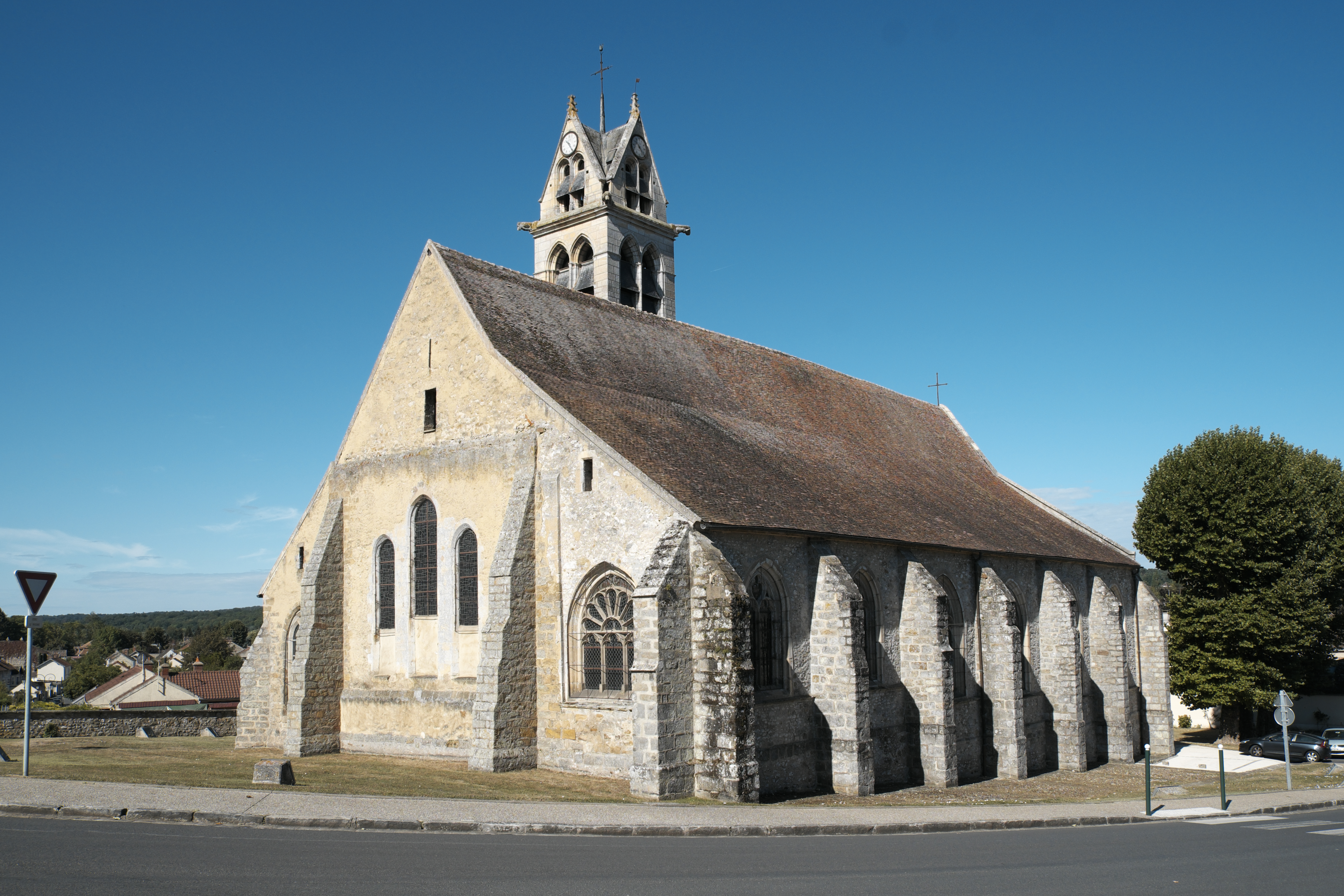 Katholische Pfarrkirche Sainte-Geneviève in Héricy im Département Seine-et-Marne (Île-de-France/Frankreich)